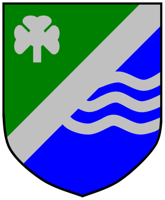 Znak Libice nad Doubravou